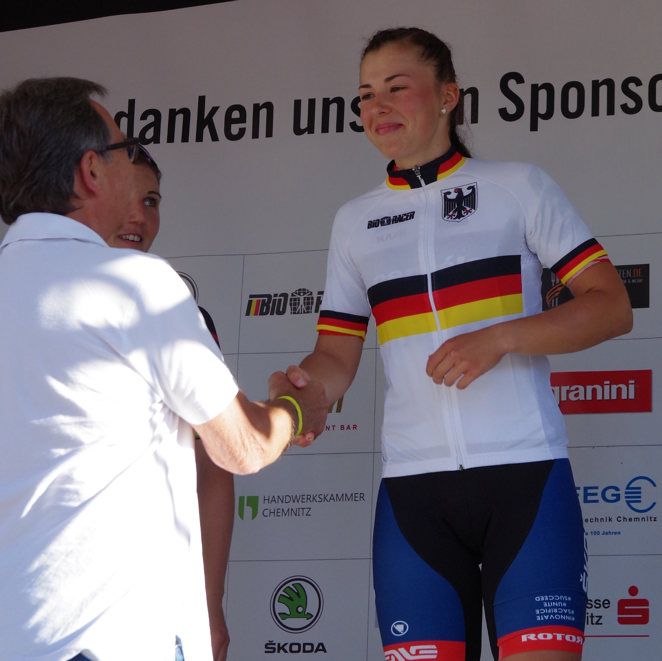 Deutsche Meisterschaften im Straßenrennen 2017 (Frauen) 24. Juni 2017 Siegerehrung Platz 1: Lisa Klein Platz 2: Lisa Brennauer Platz 3: Charlotte Becker The making of this document was supported by the Community-Budget of Wikimedia Germany.